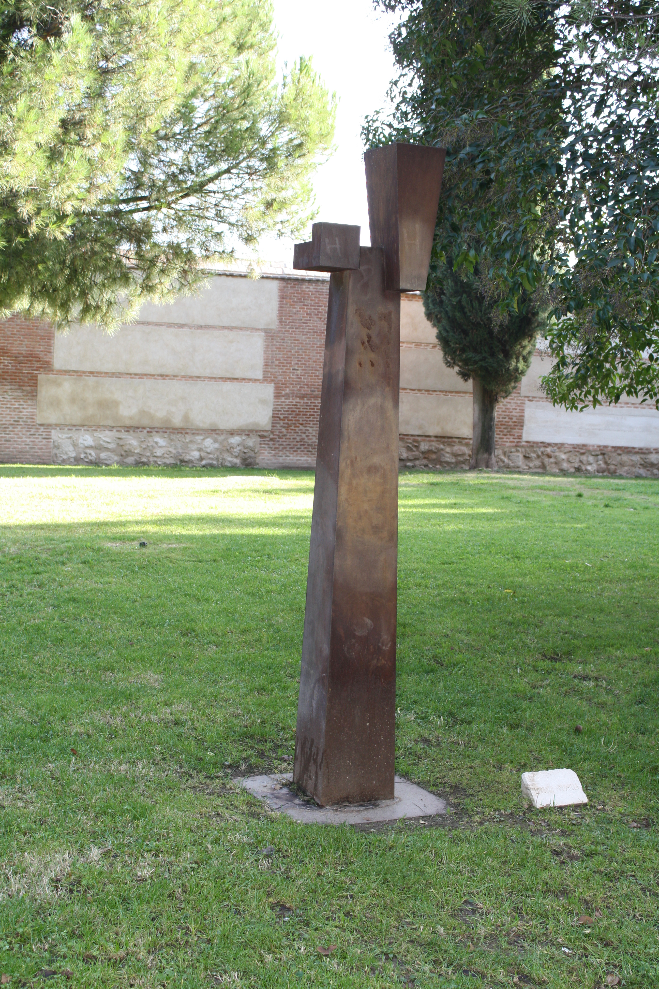 Museo de escultura al aire libre. Escultor: Lorenzo Frechilla. Alcalá de Henares. Comunidad de Madrid. España - Spain.